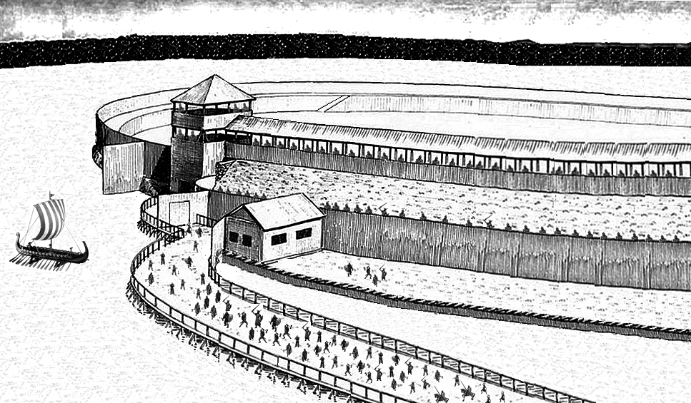 Belagerung der Burg Behren-Lübchin durch die Dänen im Jahr 1171; Rekonstruktionsversuch nach einer Vorlage von Ewald Schuldt